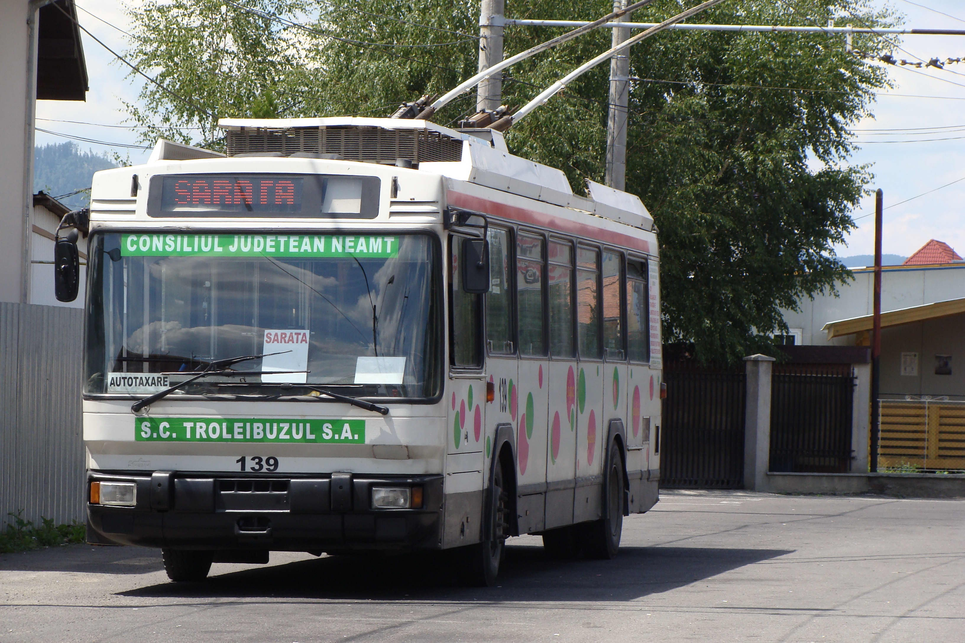 Le trolleybus 139 sur la ligne T1 au terminus Sarata